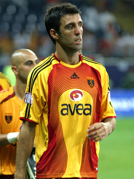 Hakan Şükür beim ( instagram name : imran_tk follow me !!Spiel um den türkischen Super-Cup (Süper Kupa) 2006 in Frankfurt.